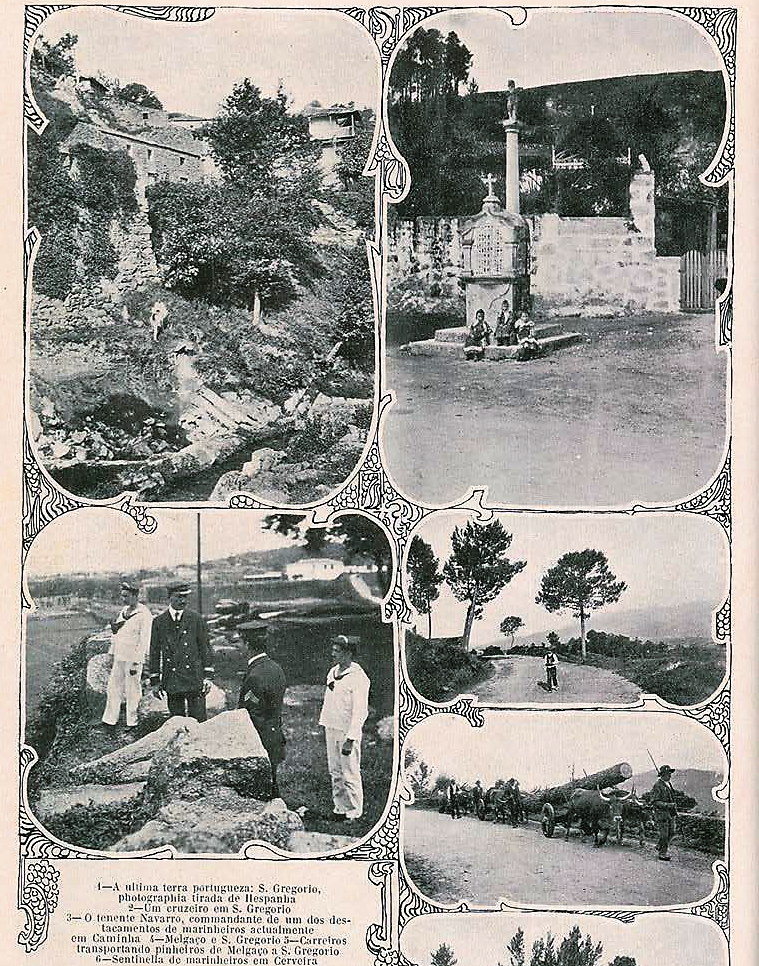 Excerto da fotoreportagem "No Paíz dos Conspiradores", da revista "Ilustração Portugueza", edição de 3 de Julho de 1911